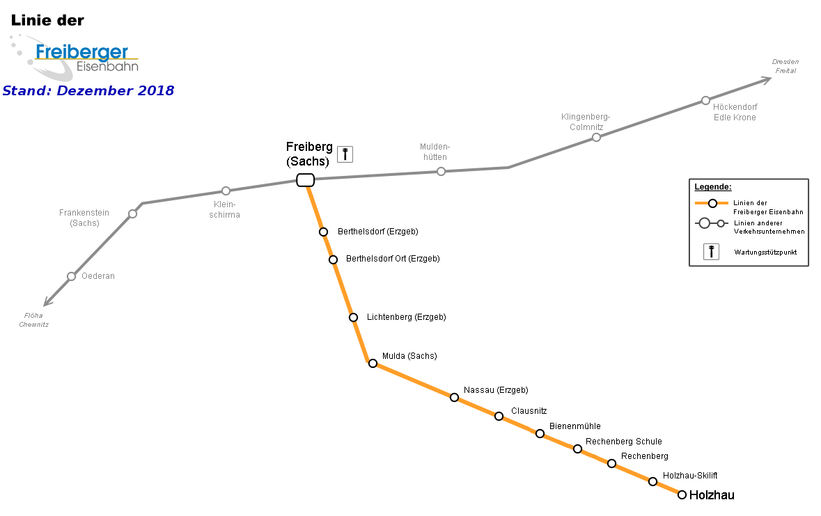 Netz der Freiberger Eisenbahn